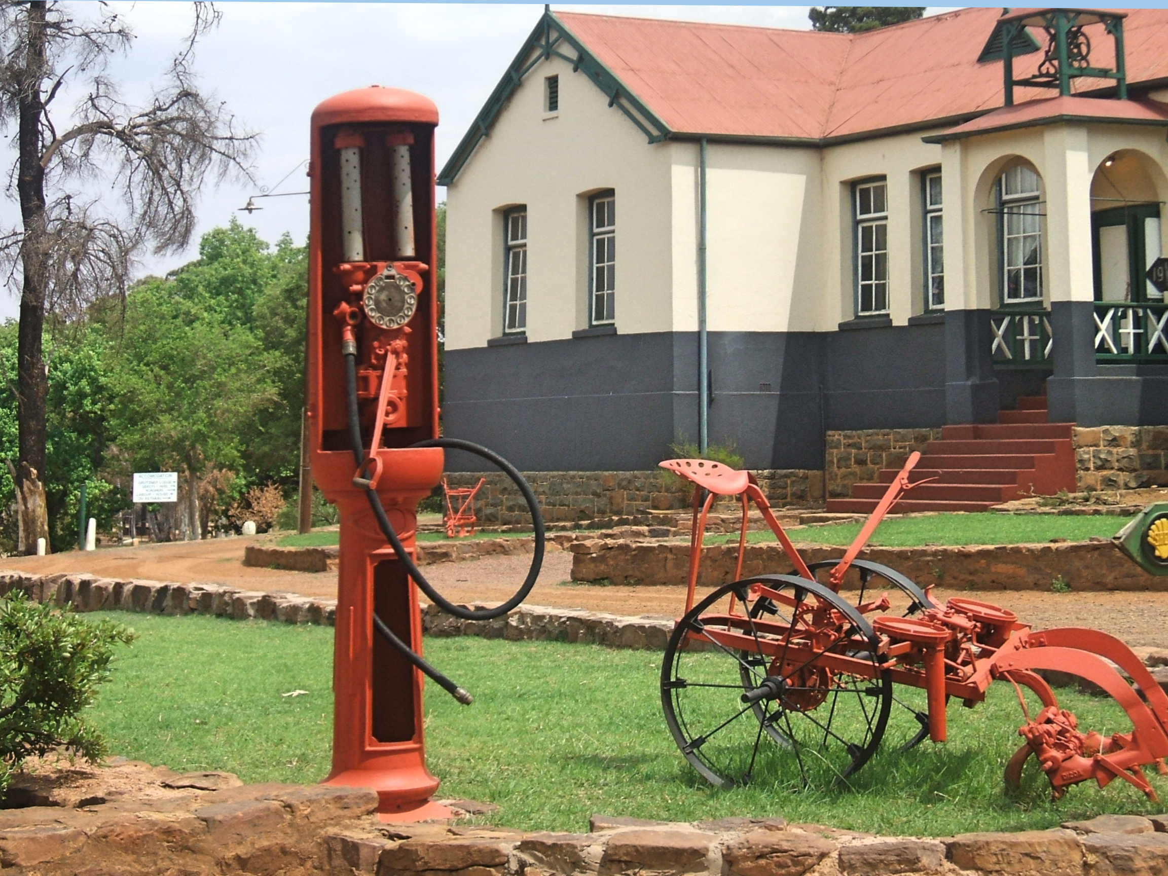 La mission de Botshabelo Ndebele, province de Mpumalanga, en Afrique du Sud This is an image with the theme "Africa on the Move or Transport" from: South Africa